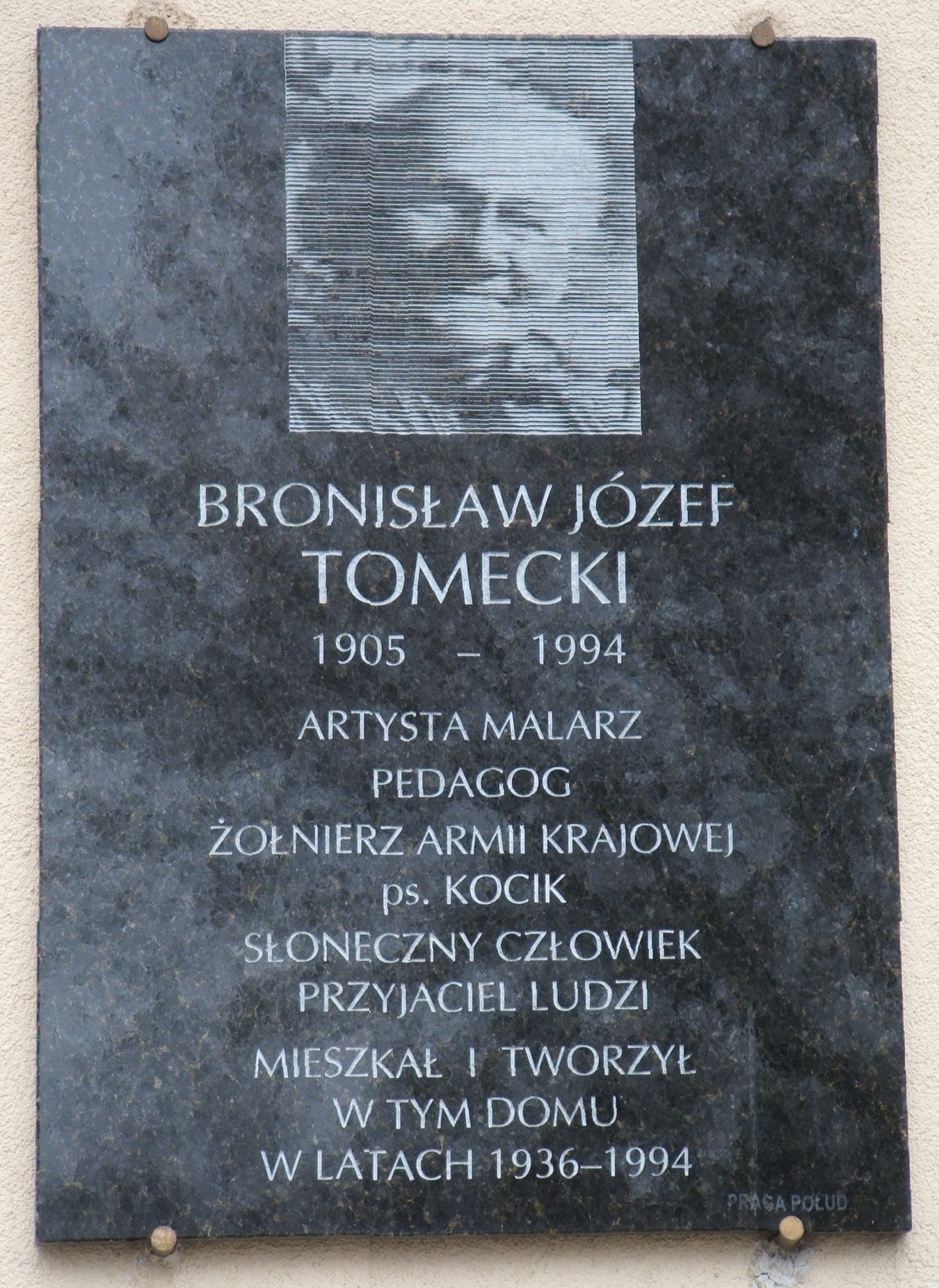 Tablica upamiętniająca Bronisława Tomeckiego na jednym z domów na Saskiej Kępie